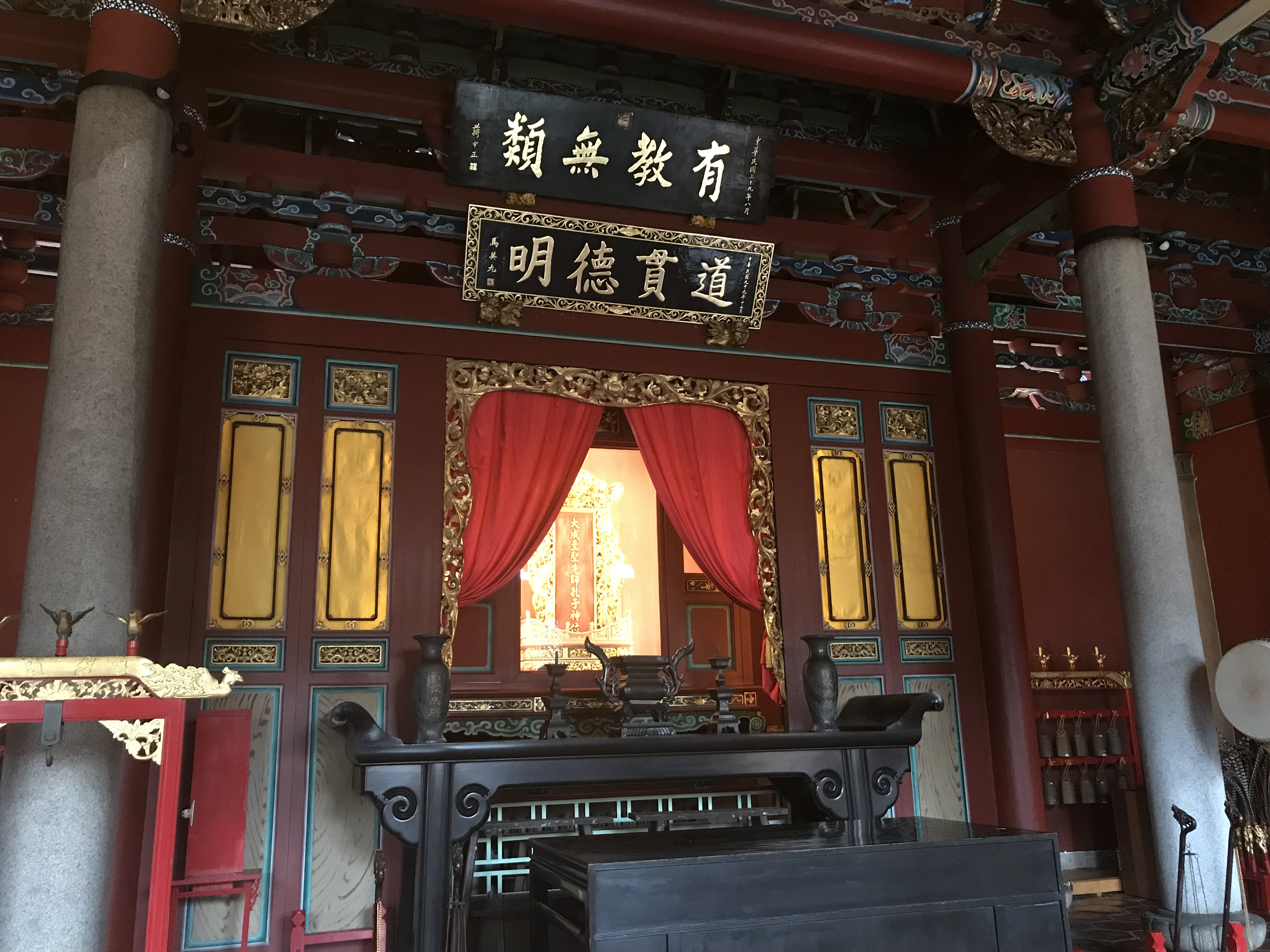 臺北孔子廟大成殿內